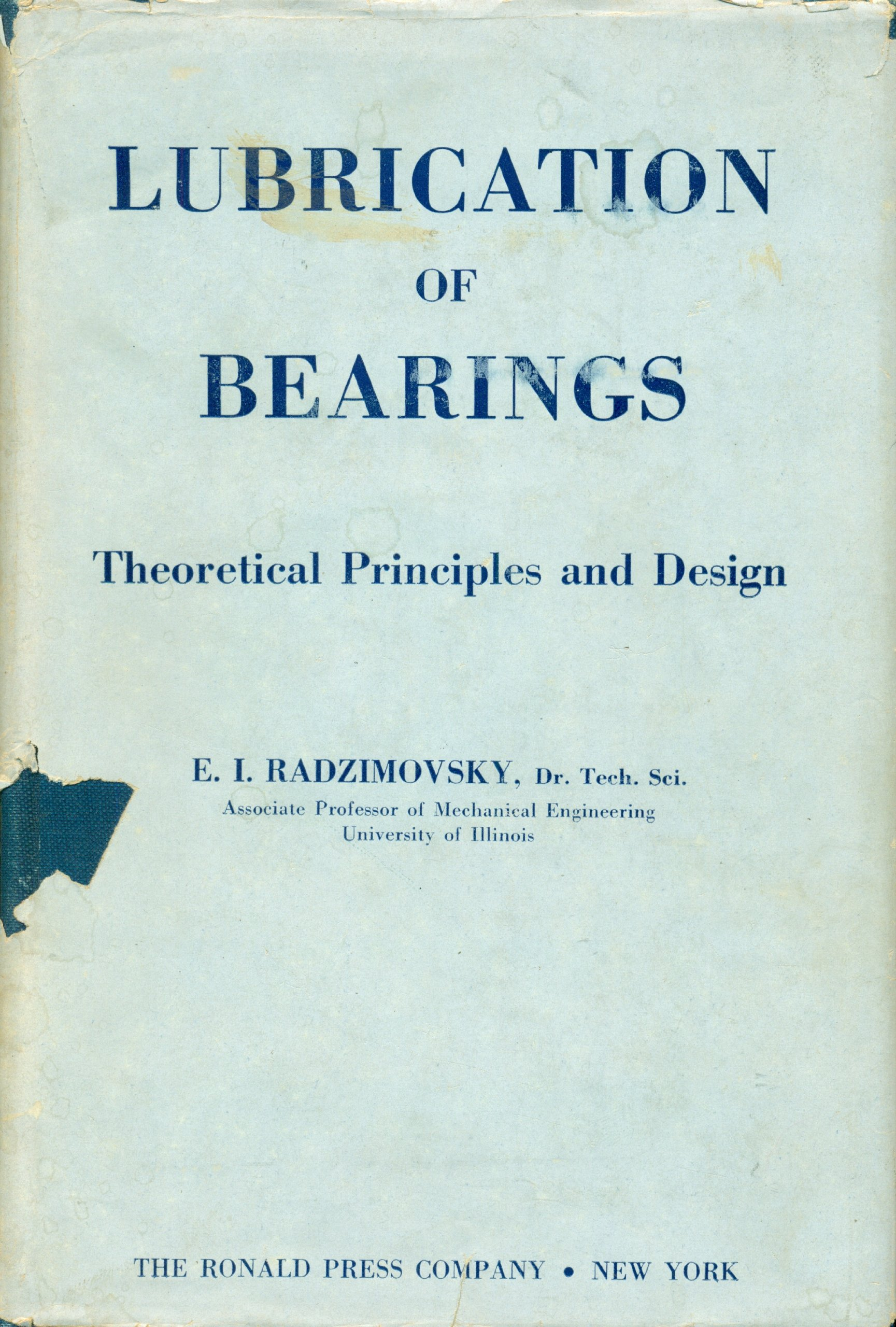 Lubrication of Bearings Theoretical Principles and Design 2017